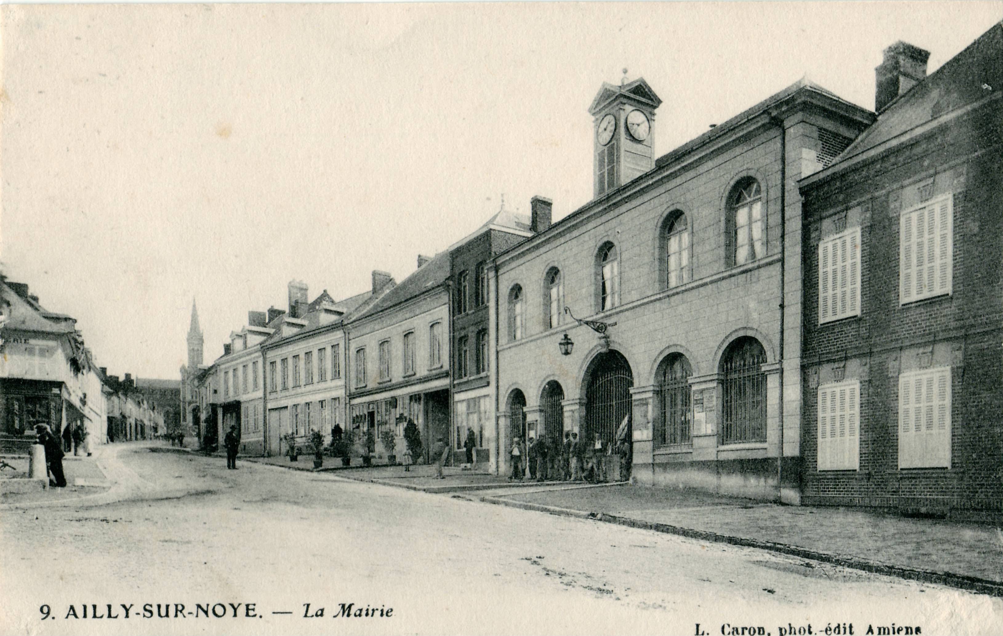 Carte postale ancielle éditée par Caron, N°9Ailly-sur-Noye : L'ancienne Mairie